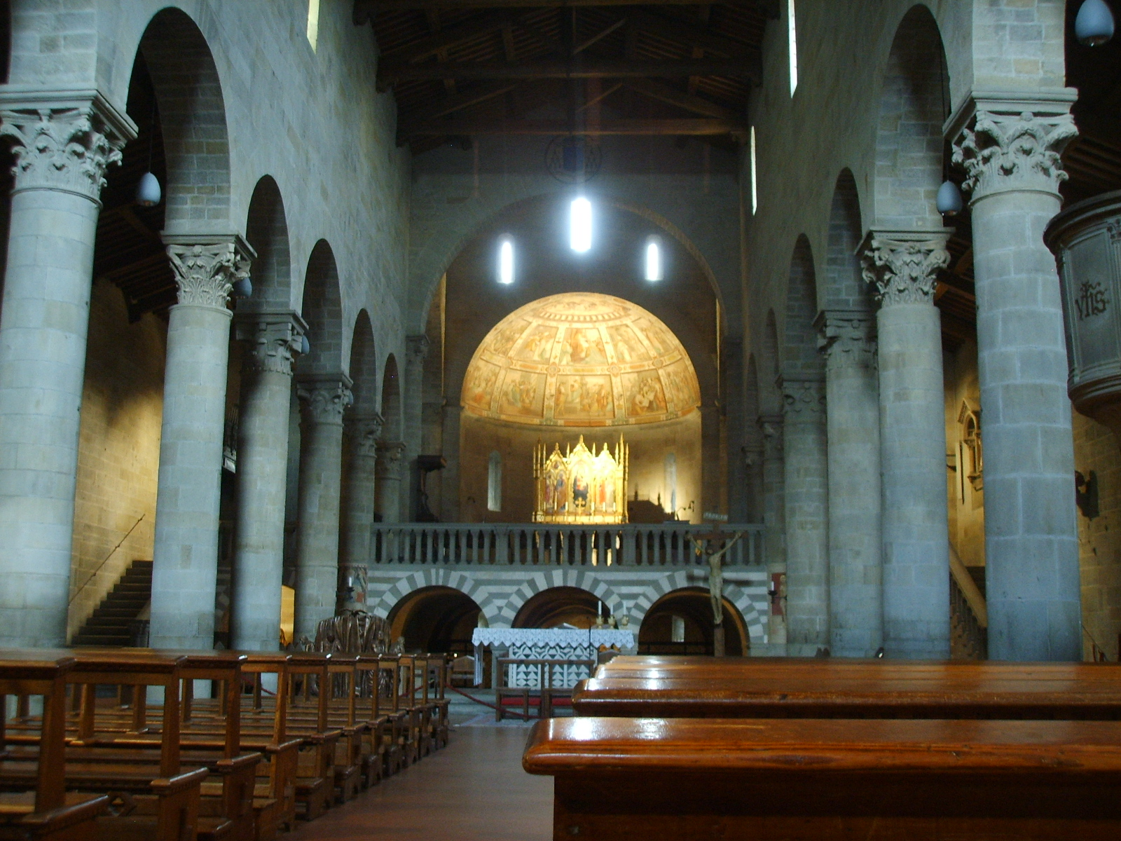 Duomo di fiesole, interno